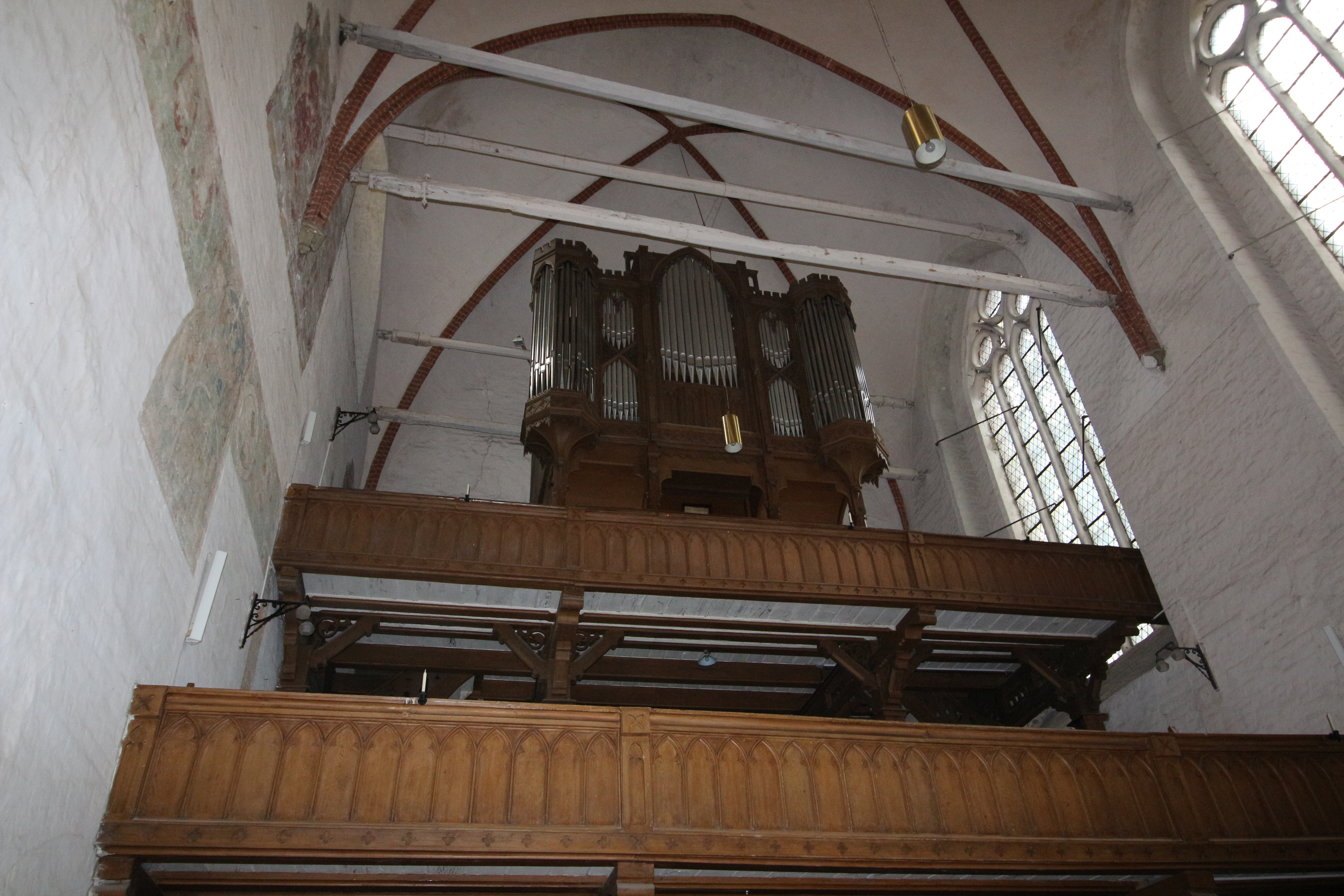 Orgel der Klosterkirche Rehna